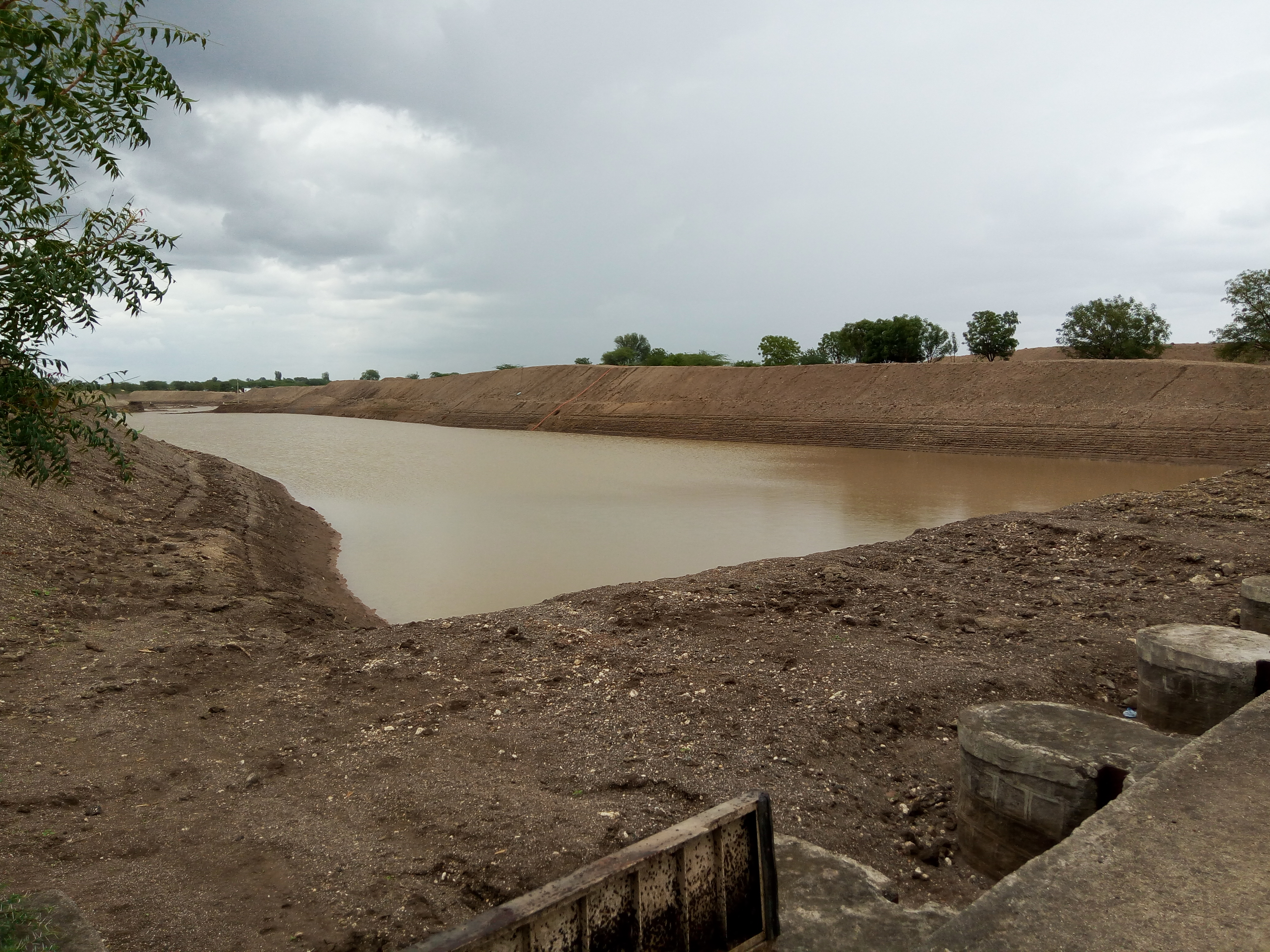 बजाज जल संधारन प्रकल्प